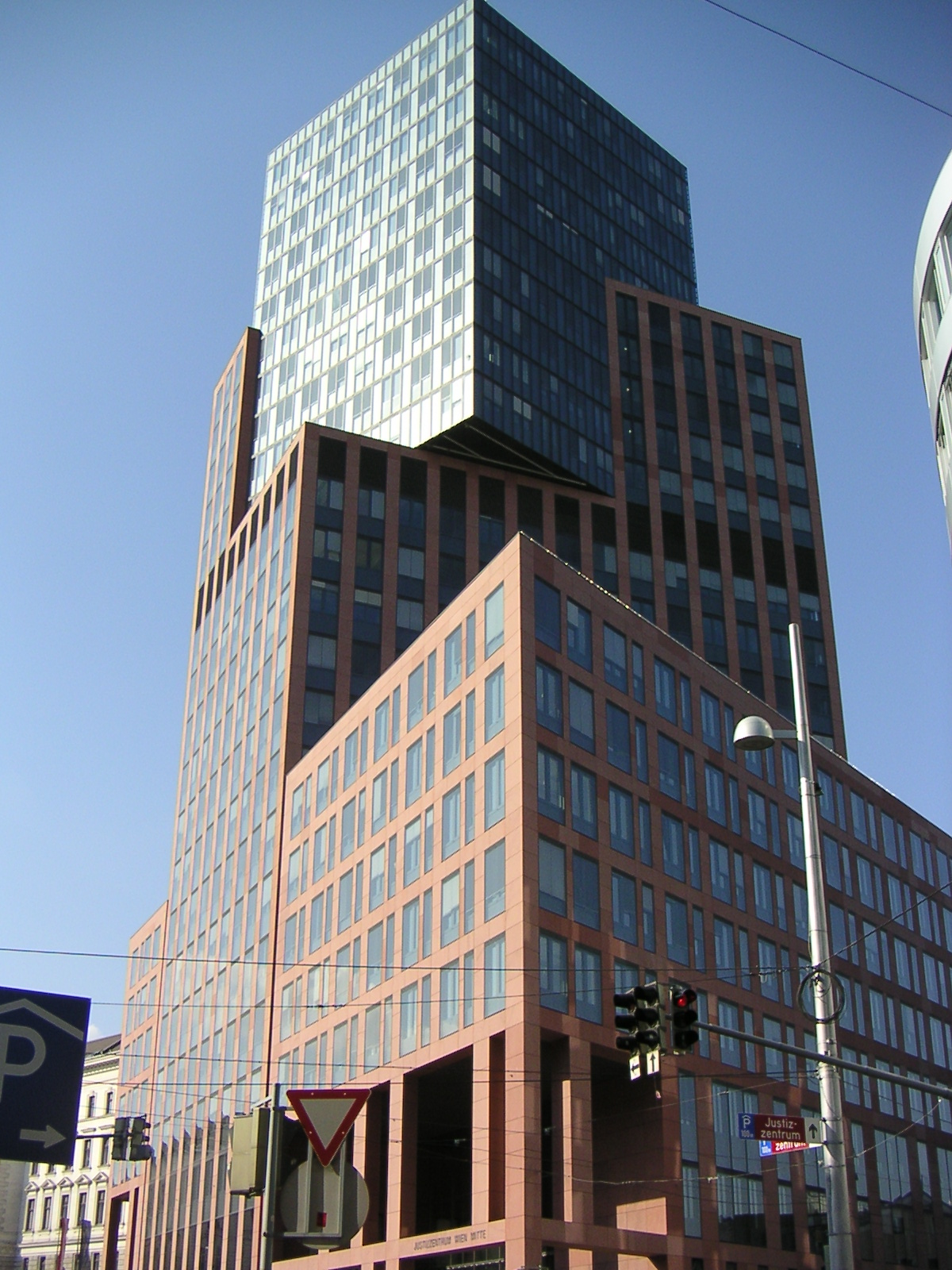 Justizzentrum Wien Mitte